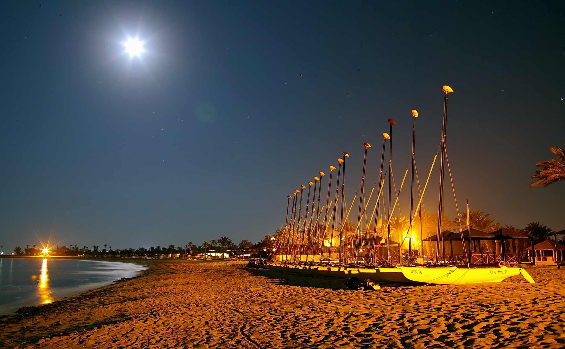 Strand am Mittelmeer auf Djerba im Club Méditerranée, "Djerba La Fidele", Katamarane, Langzeitaufnahme (30s), "brennender" Mondschein.und Natriumdampflampenlicht, "verwischte" Sterne auf Grund von Erdrotation.